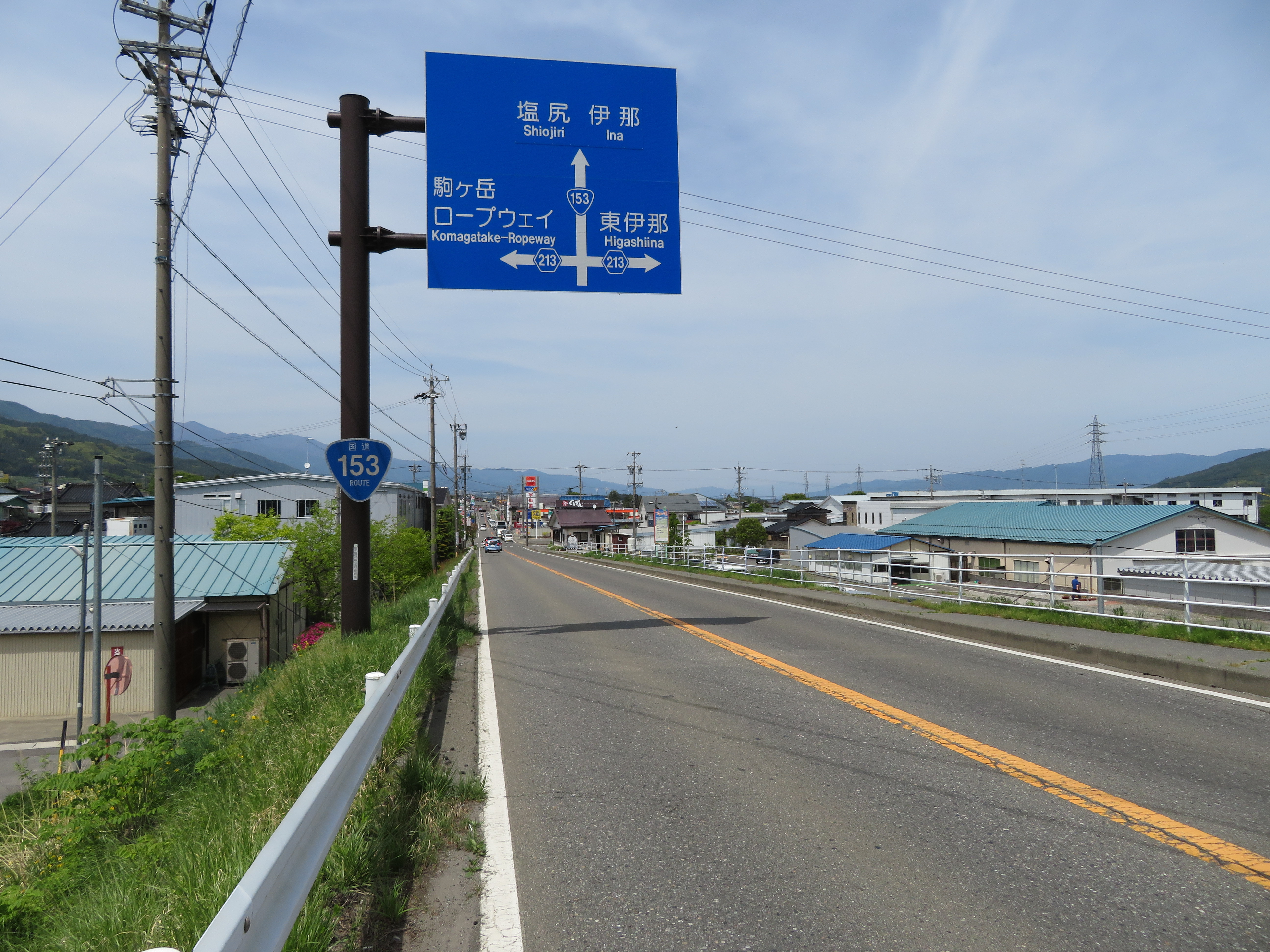 国道153号線長野県上伊那郡宮田村内（河原町交差点南側付近） Canon PowerShot SX720 HS